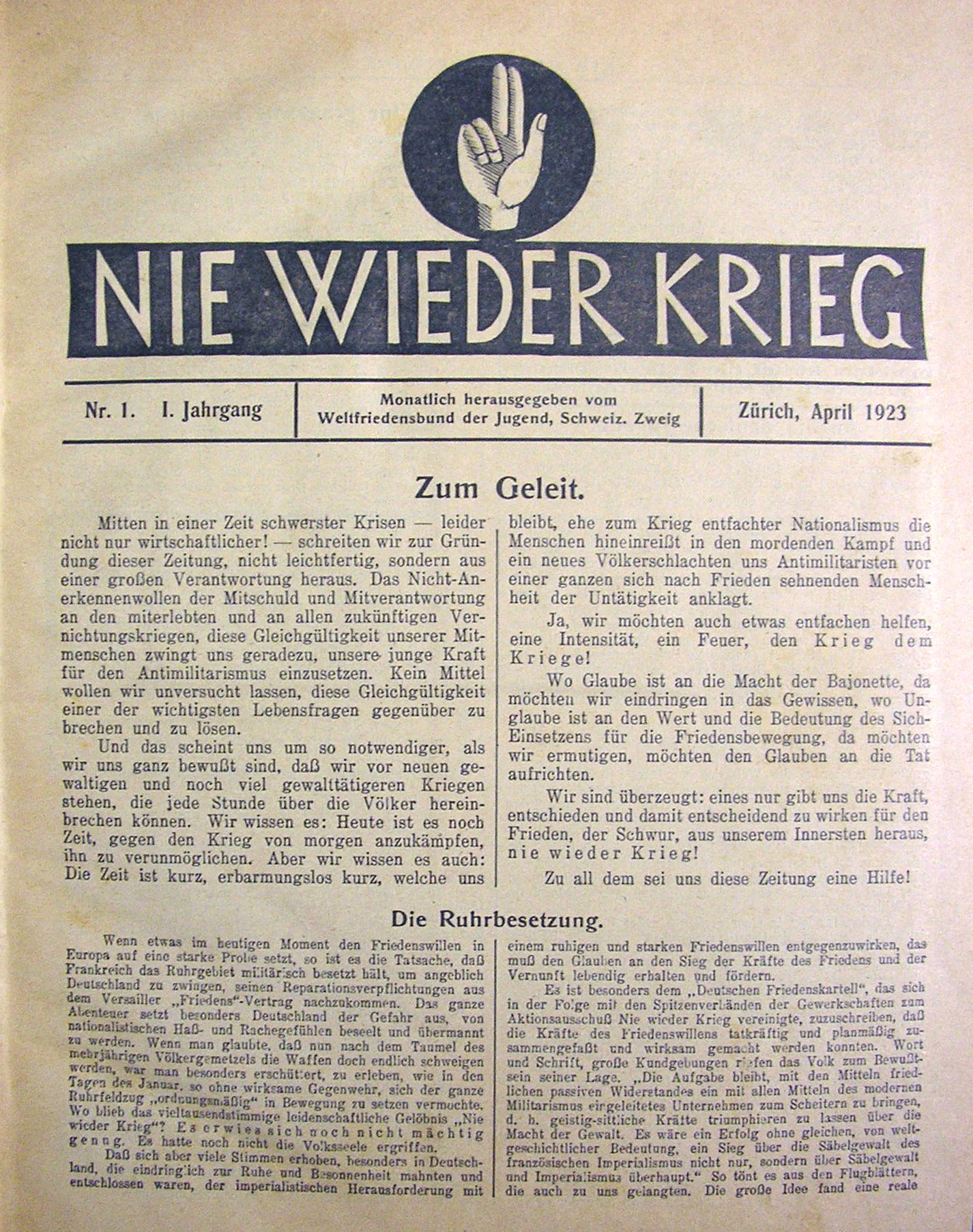 Premier numéro du périodique mensuel "Nie wieder Krieg" publié à Zurich par le "Weltfriedensbund der Jugend - Schweizer Zweig", Avril 1923.